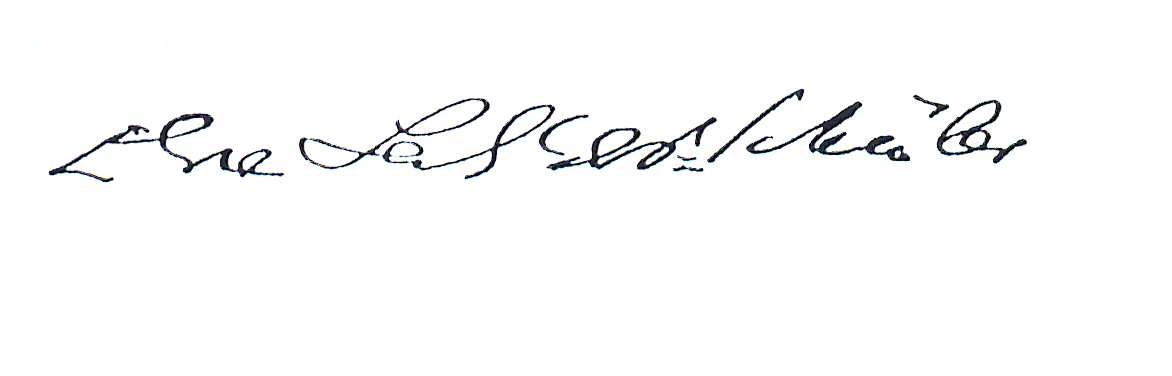 Else Lasker-Schüler Signatur 1929 Unterschrift zu einer autobiographischen Skizze in Führende Frauen Europas, 2 Bände. München 1928 und 1930